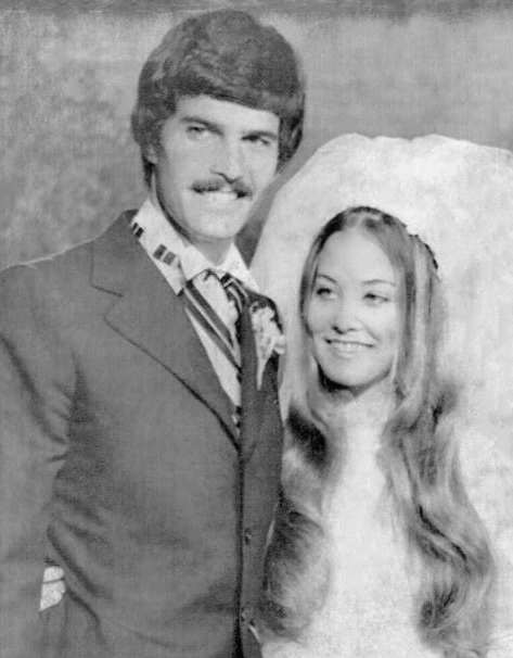 Mark Spitz and wife, Susan Weiner. - Vintage photo